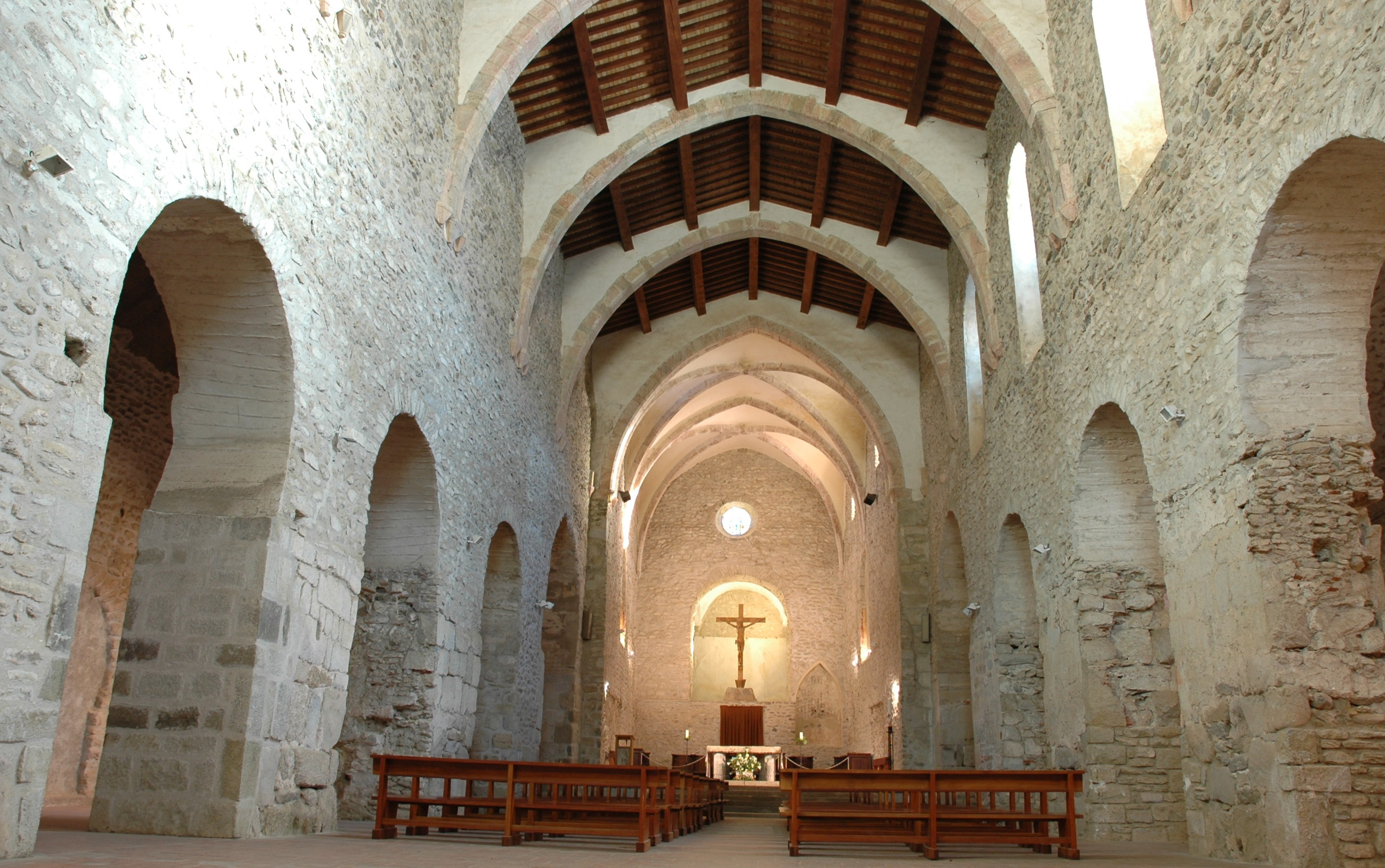 Sant Miquel de Cuixà - Interior església